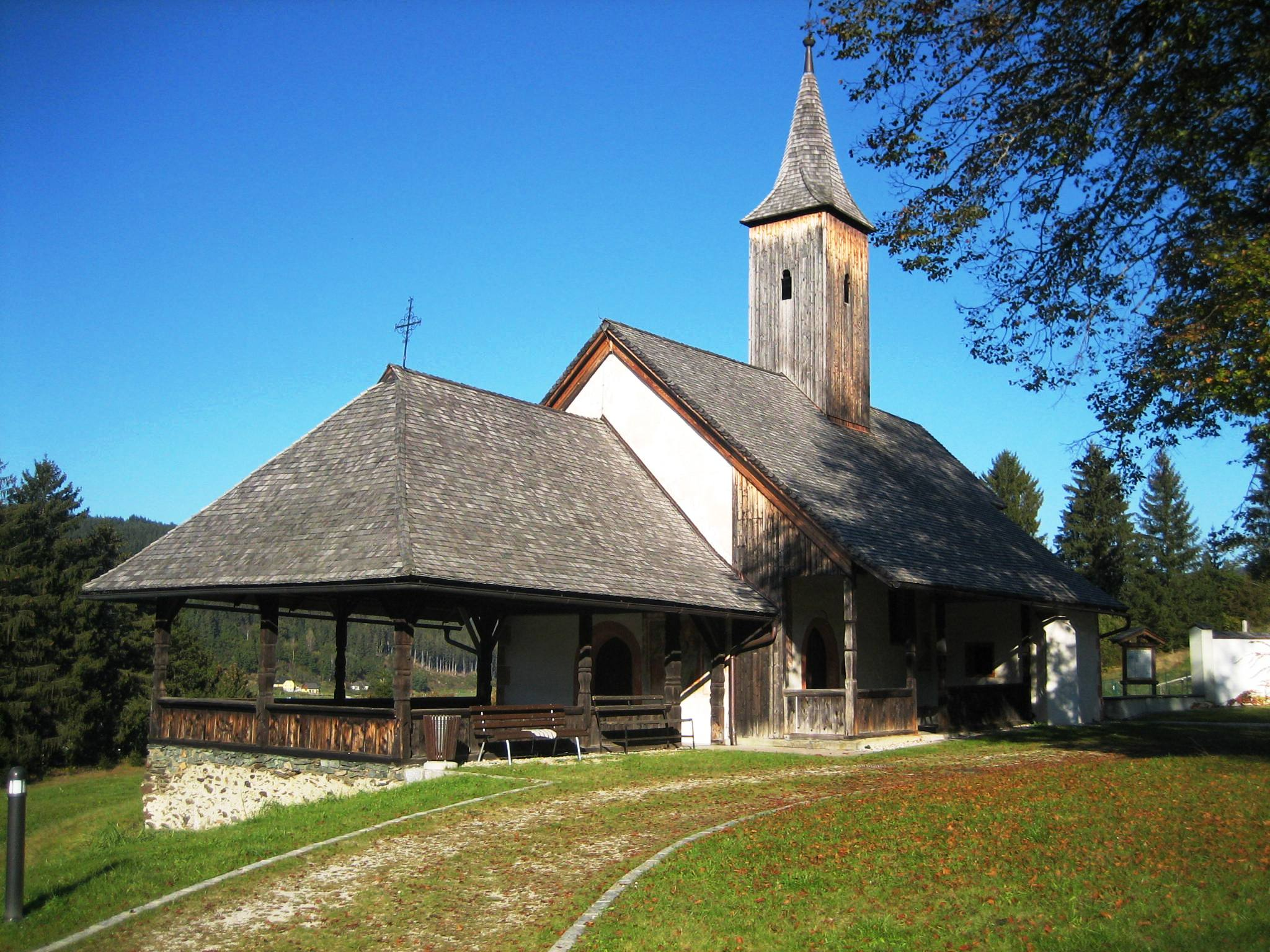 Kath. Filialkirche hl. Maria Magdalena